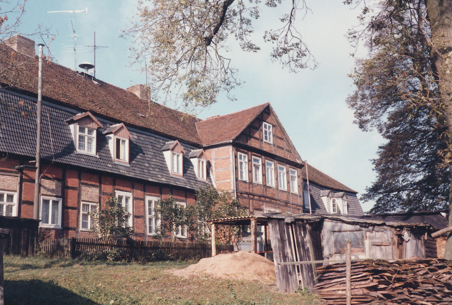 Historisches Gutshaus in Vielist Datum: um 1980 Urheber: verstorbene Bekannte der eigenen Familie Quelle: privates Fotoalbum der eigenen Familie Hinweis: das Foto wurde meiner Familie von der verstorbenen Urheberin zu "Dokumentationszwecken für die Nachwelt" explizit überlassen